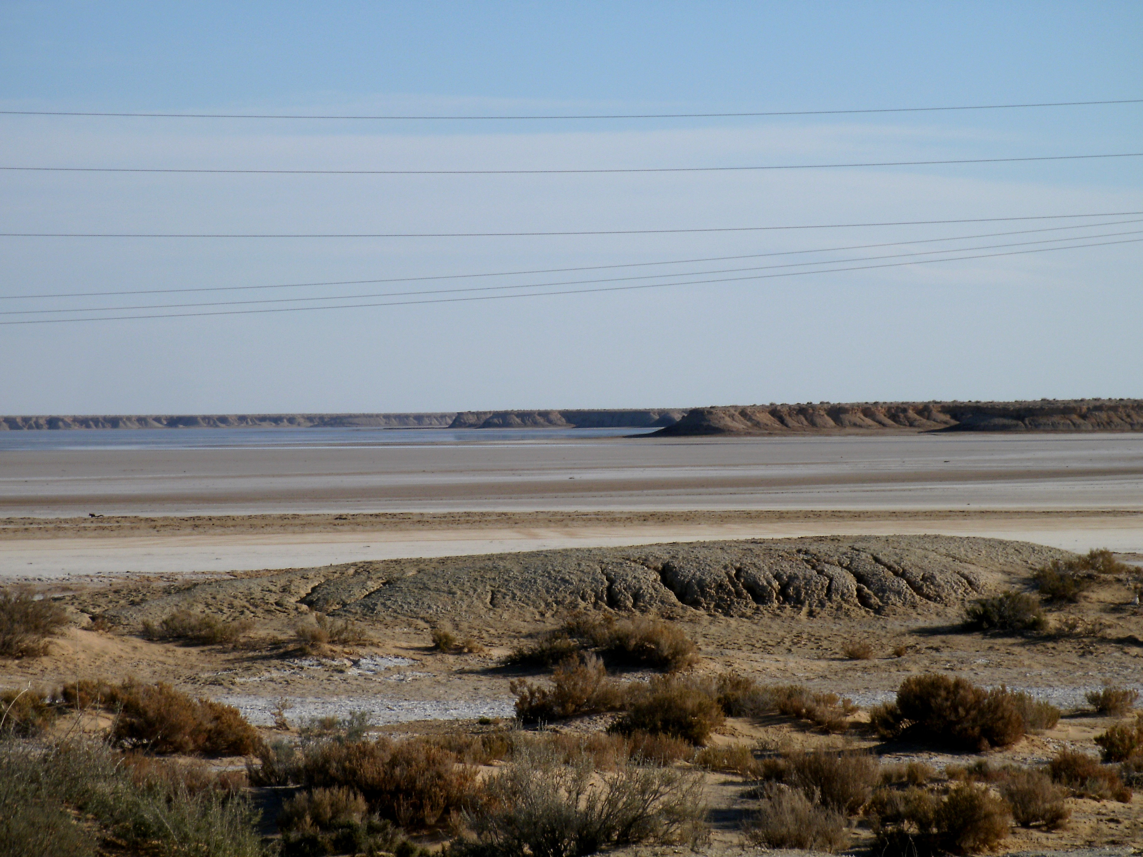 Le chott Melrhir au Sud de Still